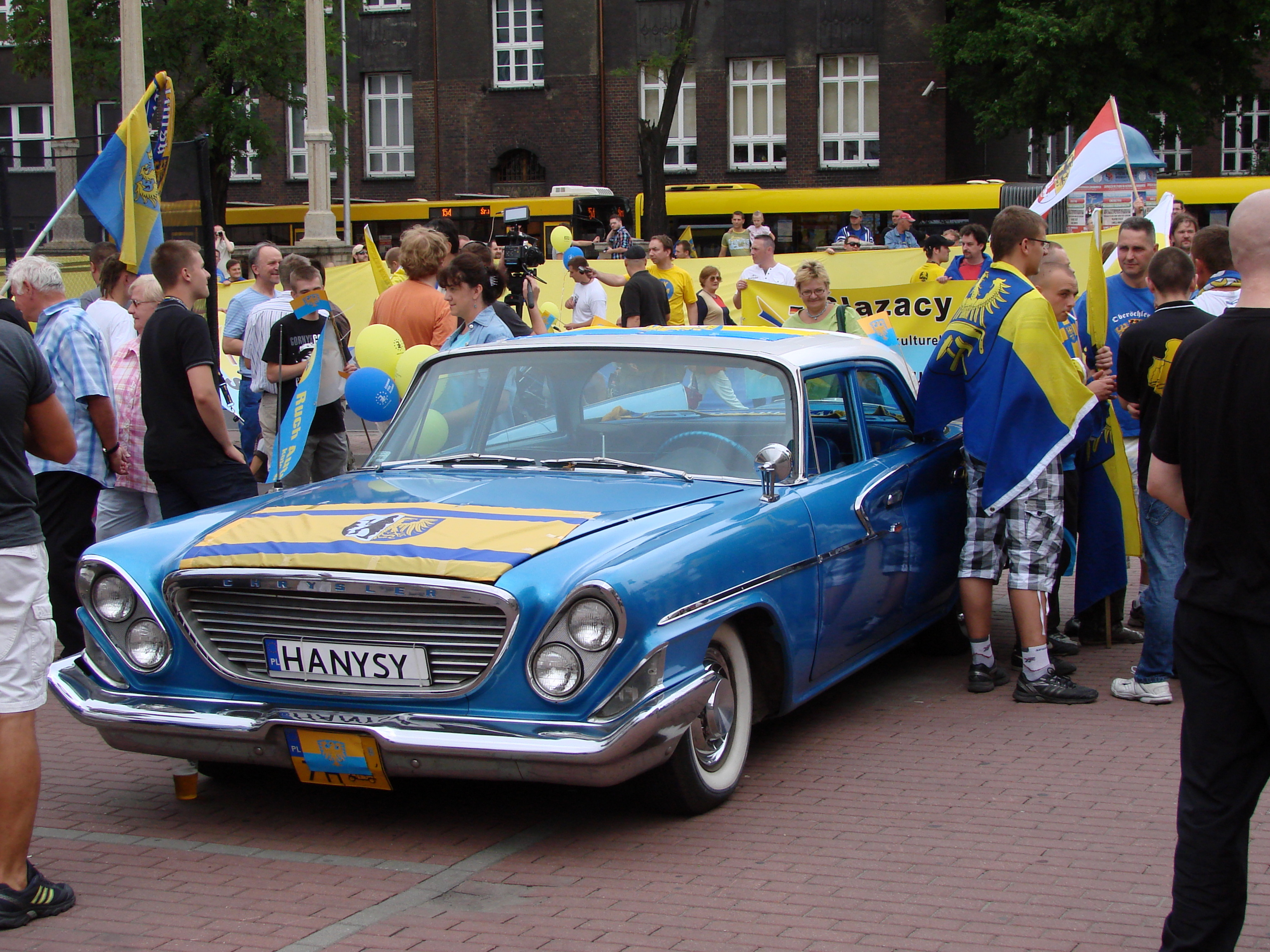 Marsz Autonomii to manifestacja odbywająca się corocznie począwszy od 2007 roku w Katowicach.